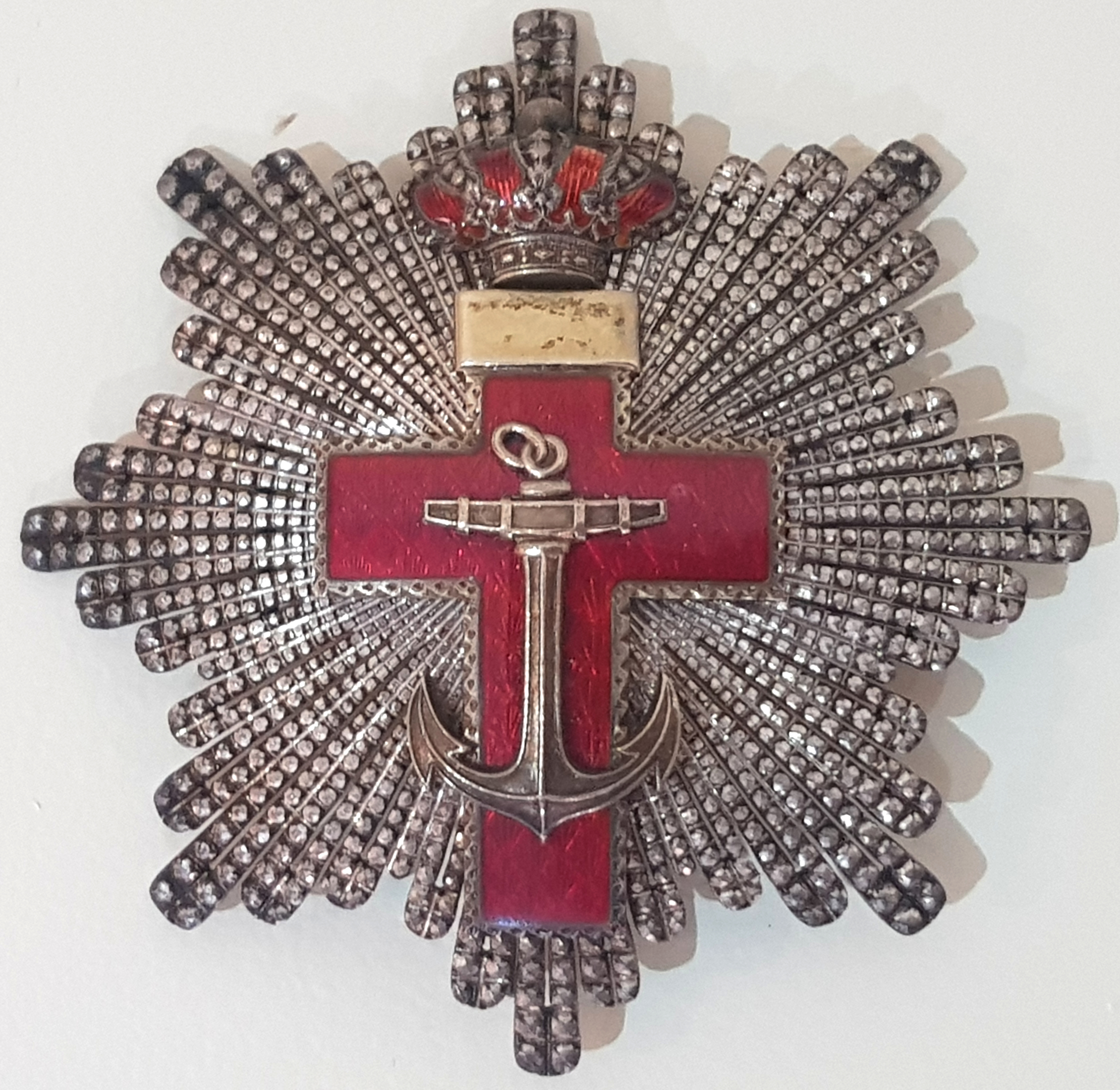 Großkreuz des spanischen Cruz del Mérito Naval. Diese Kategorie konnte verliehen werden an Stabsoffiziere und Zivilisten mit akeademischem oder verwaltungstechnischem äquivalentem Rang. Verleihungen erfolgten 1864-1995. Die hier gezeigte Variante distintivo rojo in der Ausführung 1922 war die oberste Klasse.